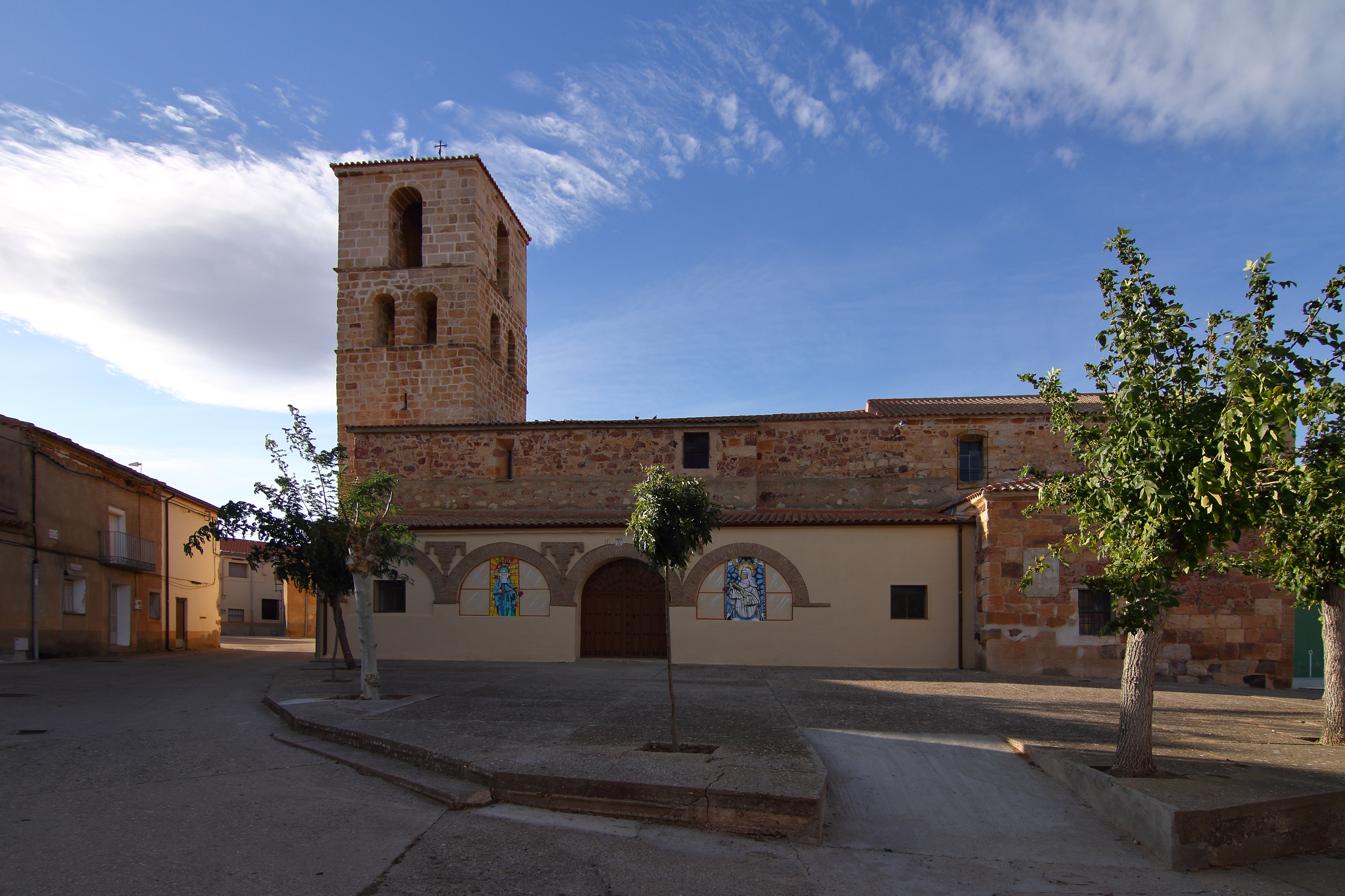 Cubillos, Iglesia de la Asunción, fachada sureste, 01